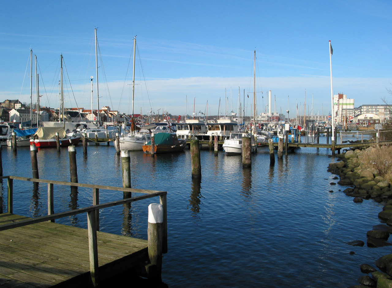 Marina am Ostufer